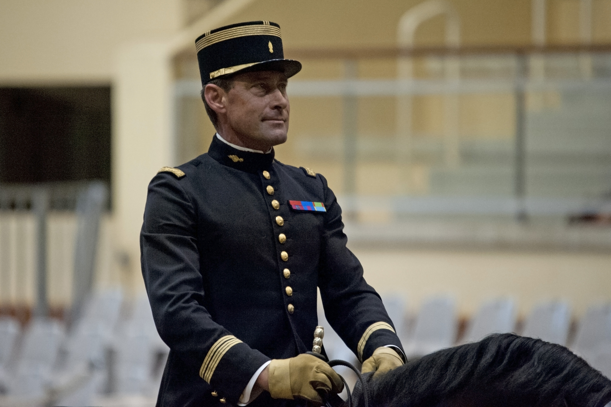 Présentation publique du Cadre noir, École nationale d'équitation, Saumur.Colonel Jean-Michel Faure, écuyer en chef.